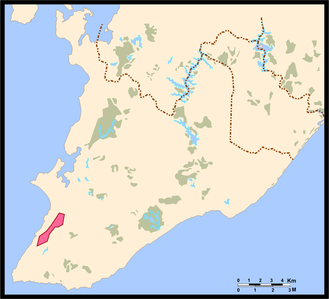 Centro Histórico de Salvador (Bahia, Brazil)